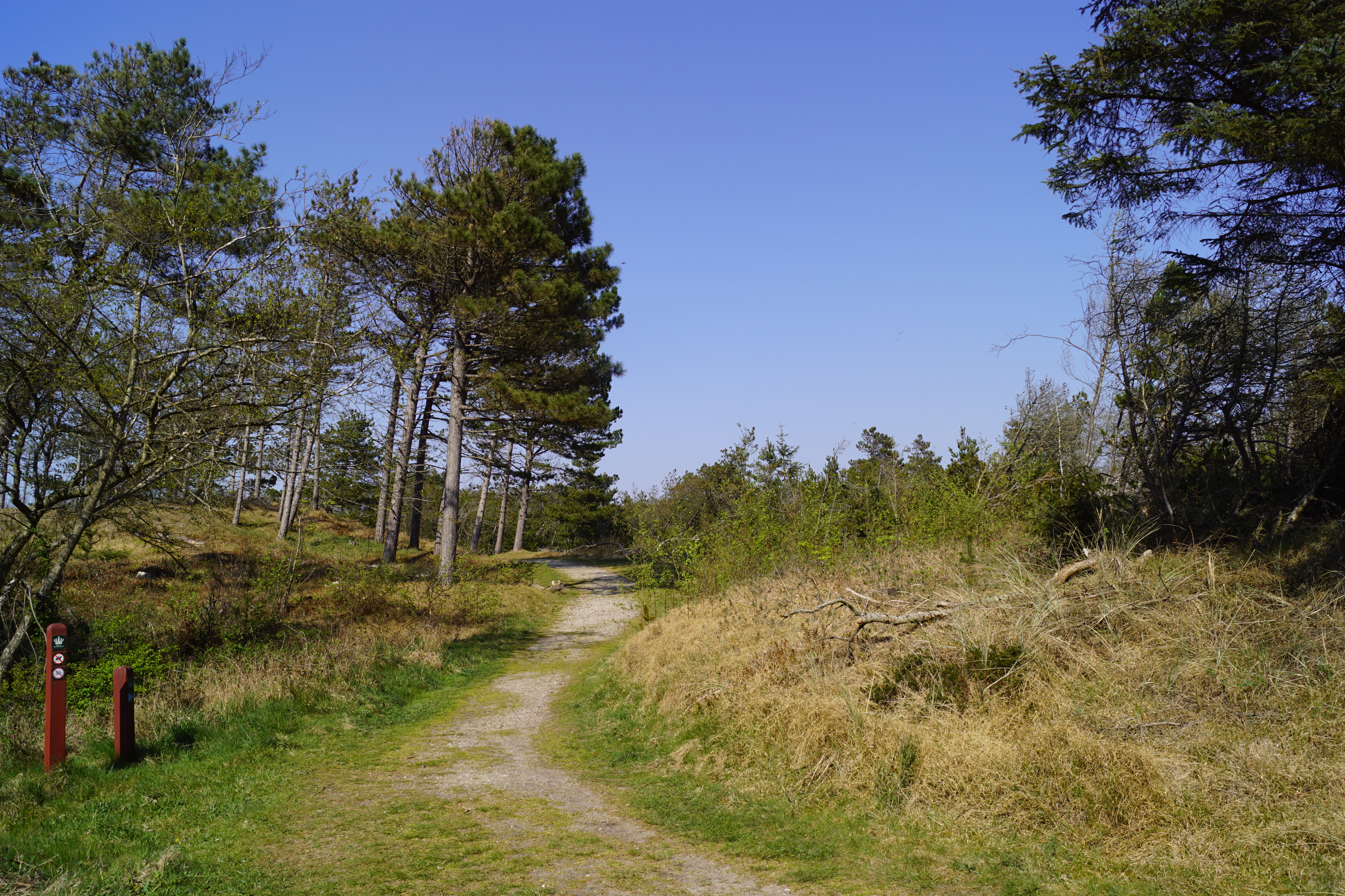 Lodbjerg Klitplantage nær Lodbjerg Fyr set mod nord